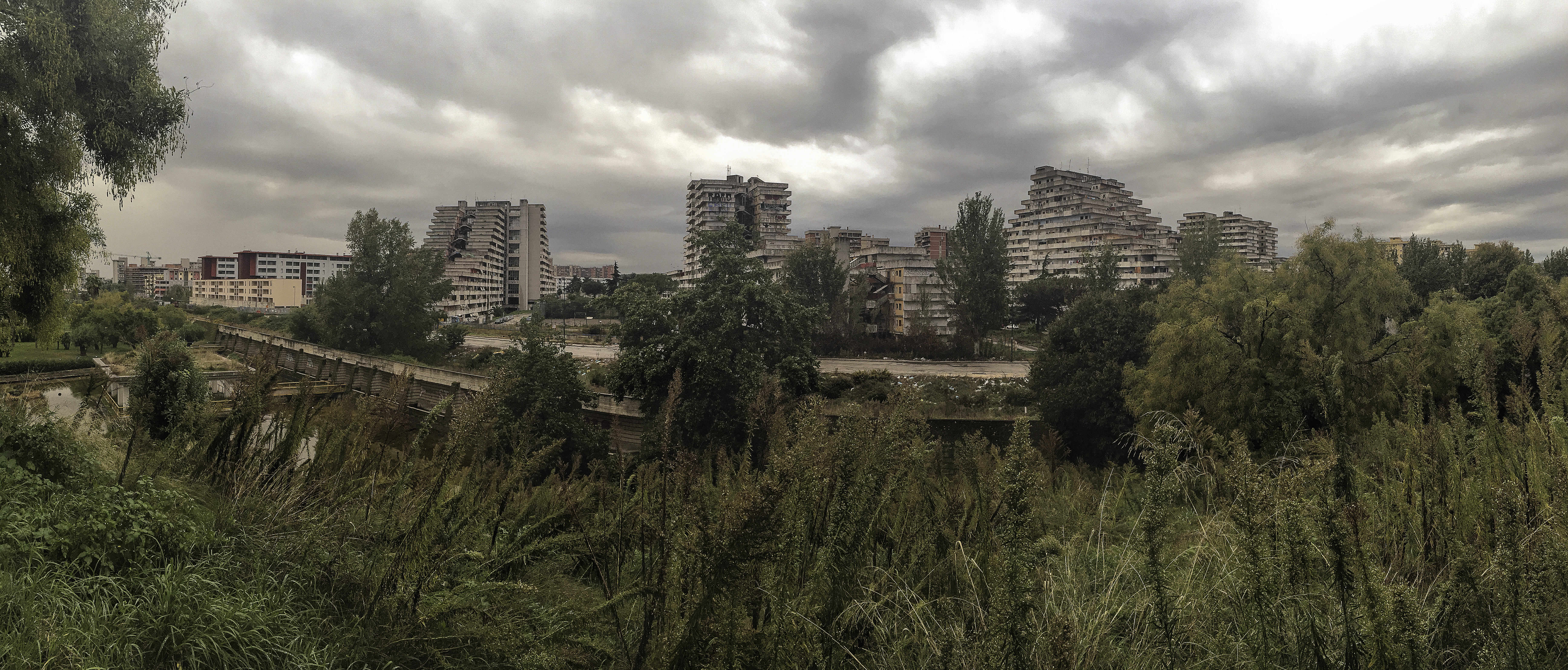 Veduta d'insieme delle vele superstiti